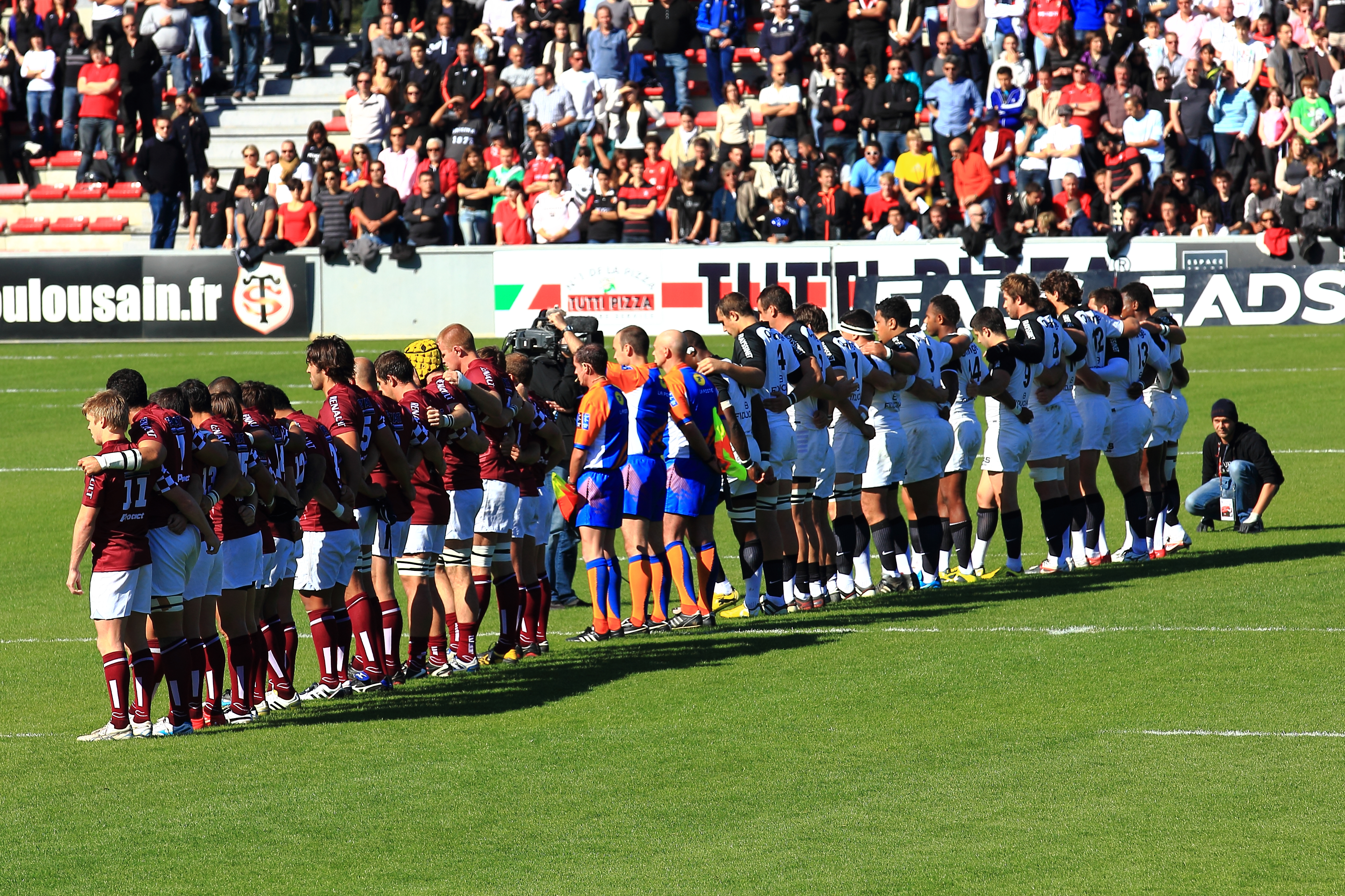 Les équipes du Stade toulousain et de l'Union Bordeaux-Bègles pendant une minute de silence au Stade Ernest Wallon